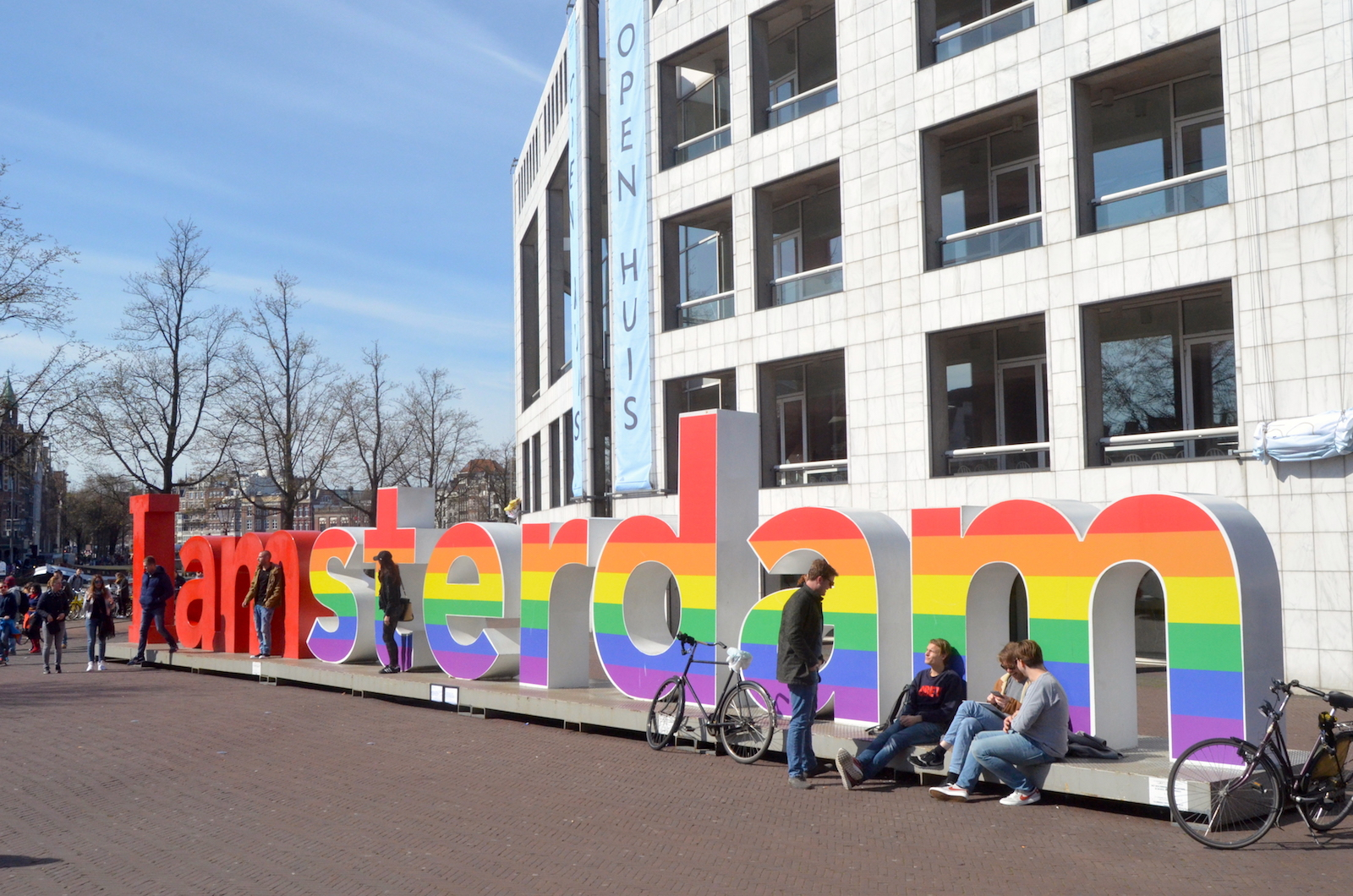 I amsterdam in Regenbooguitvoering bij de Stopera. Foto: Erik Swierstra.